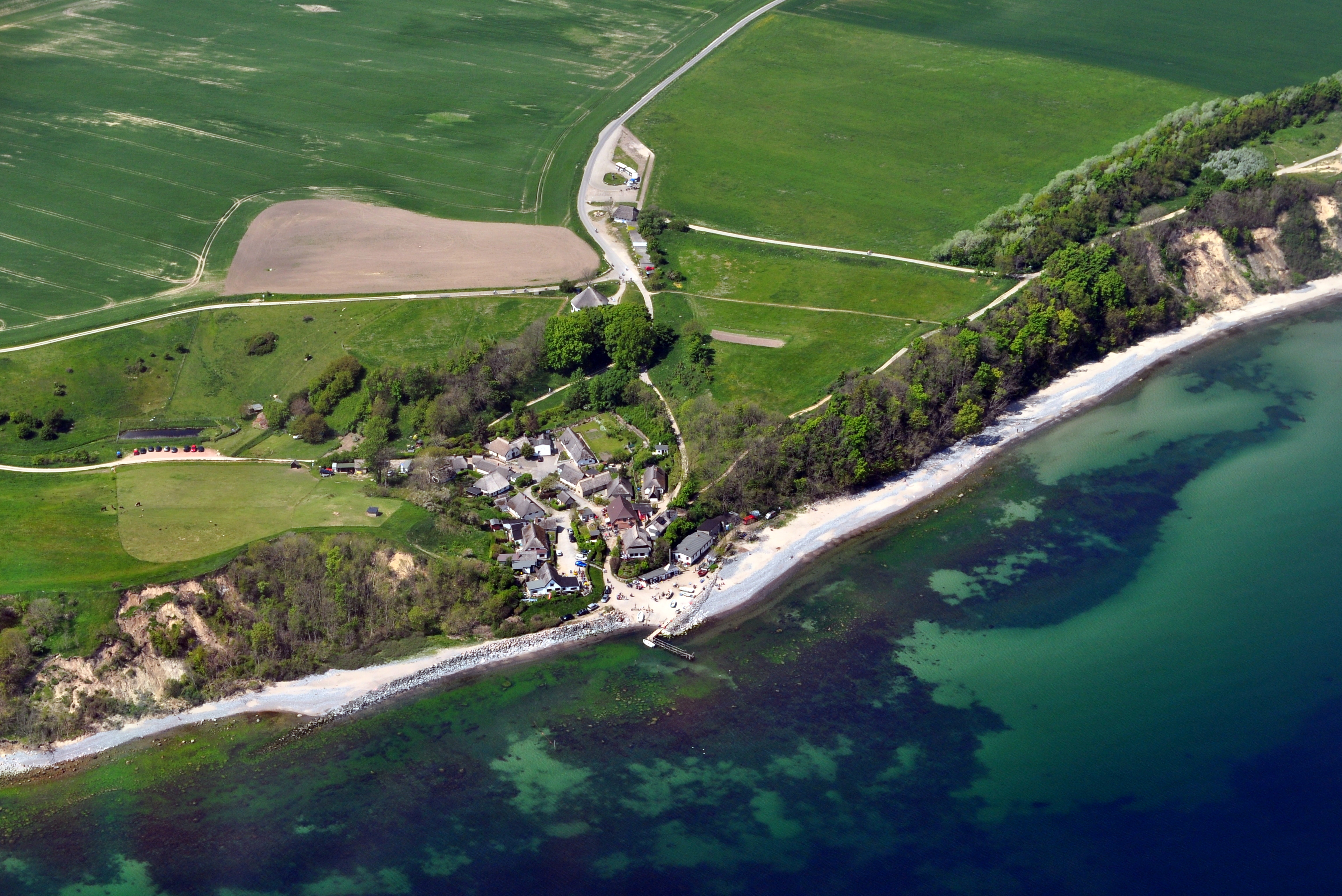 Die Bilder wurden von mir während eines einstündigen Rundflugs ab Flugplatz Güttin am 21. Mai 2011 aufgenommen. Die Bildbeschreibung steht im Dateinamen. Aufgenommen mit einer Nikon D5000 durch das Seitenfenster des Flugzeugs.